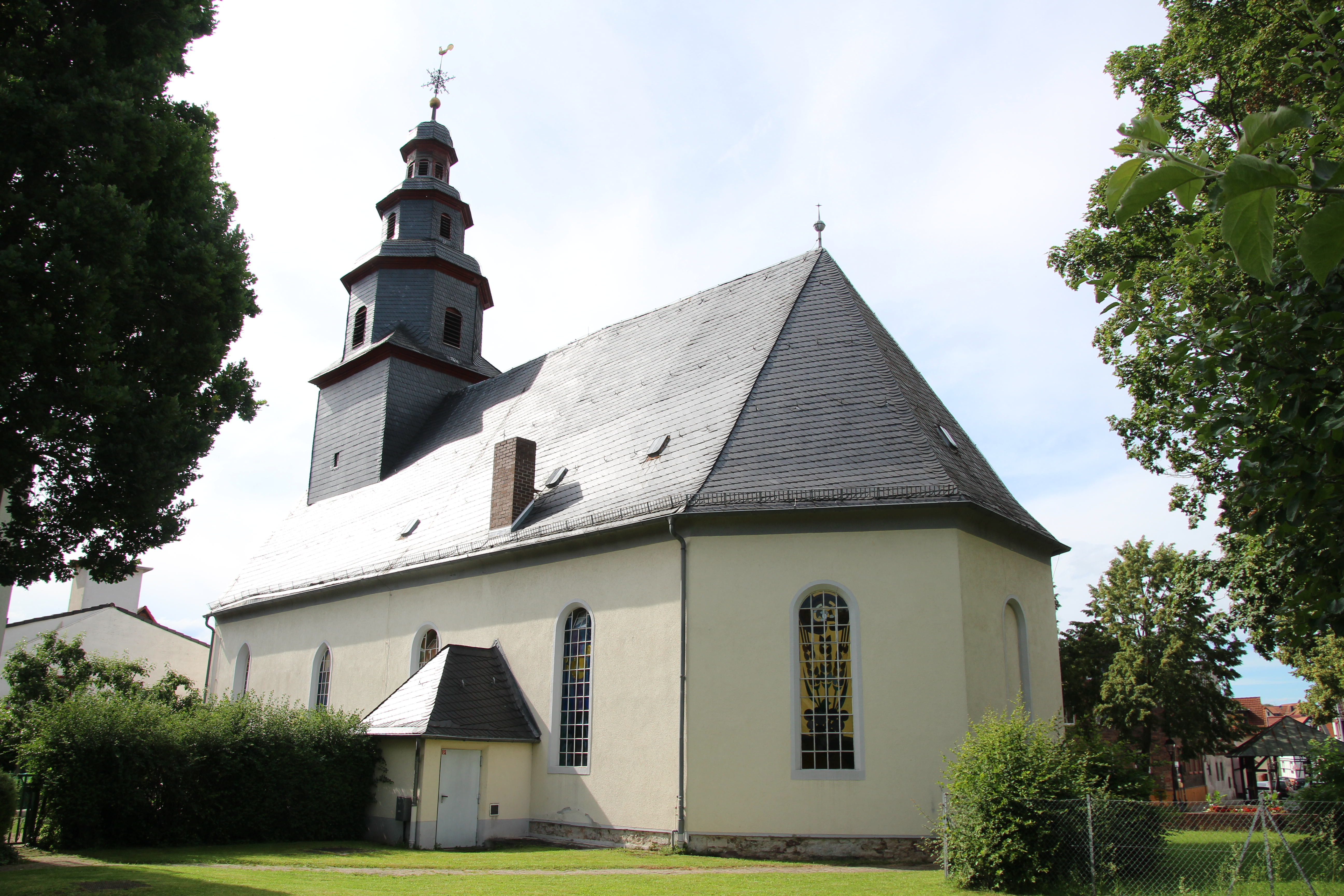 Ev. Kirche